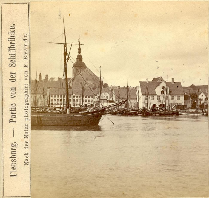 Die Schiffbrücke in Flensburg